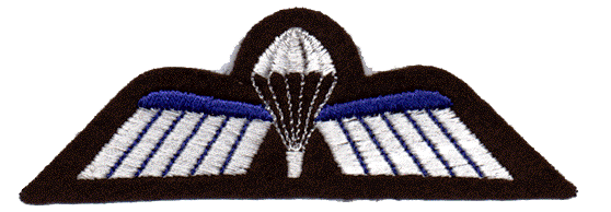 Niederländisches Fallschirmabzeichen aktuell